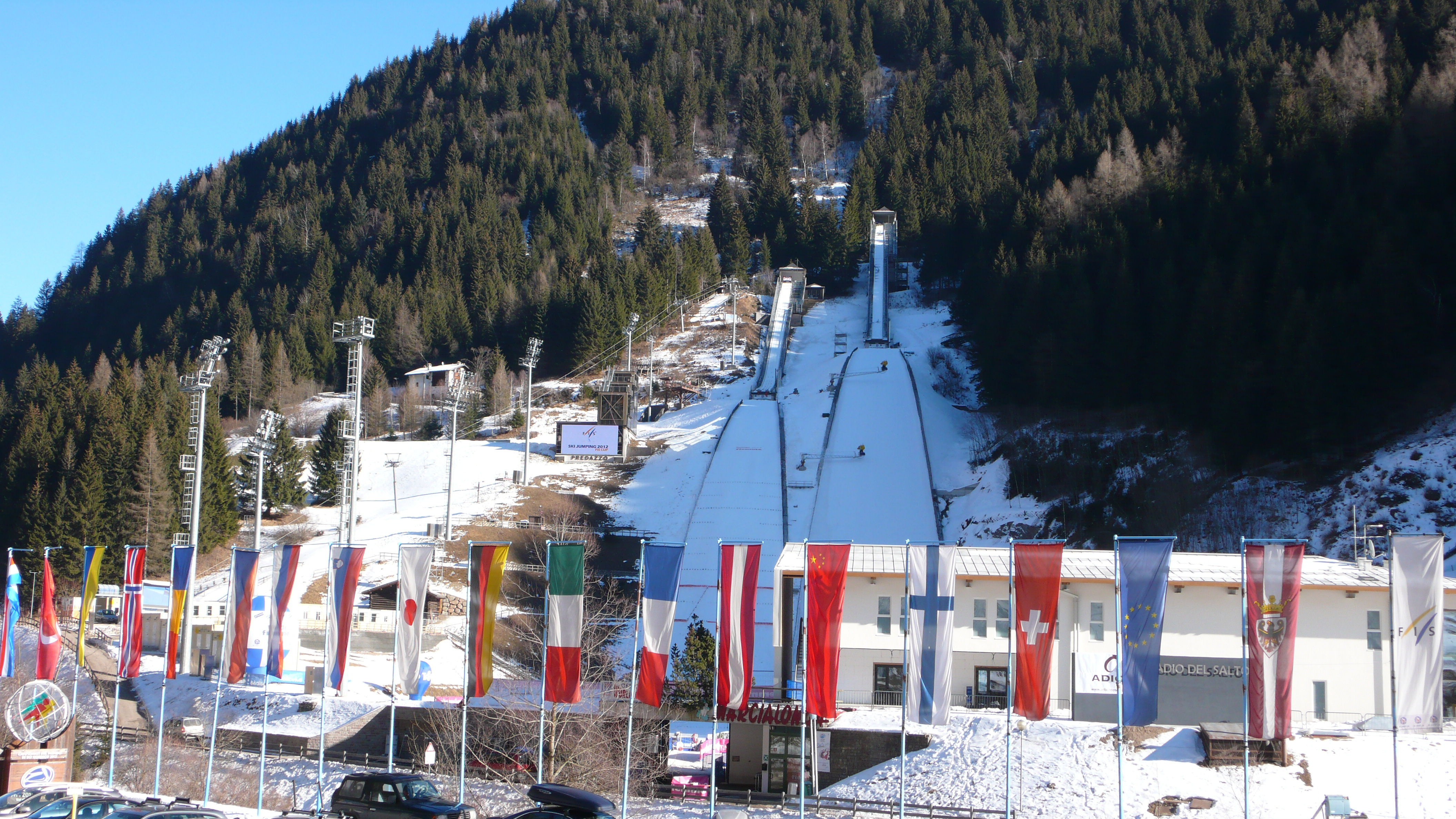 Gli Trampolini Giuseppe Dal Ben di Predazzo